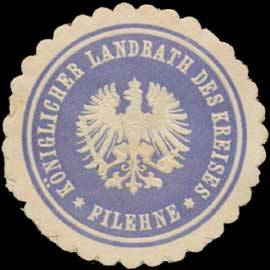 Sealing stamp Title: K. Landrath des Kreises Filehne Description: blau, weiß, geprägt Place: Filehne size: 4 cm